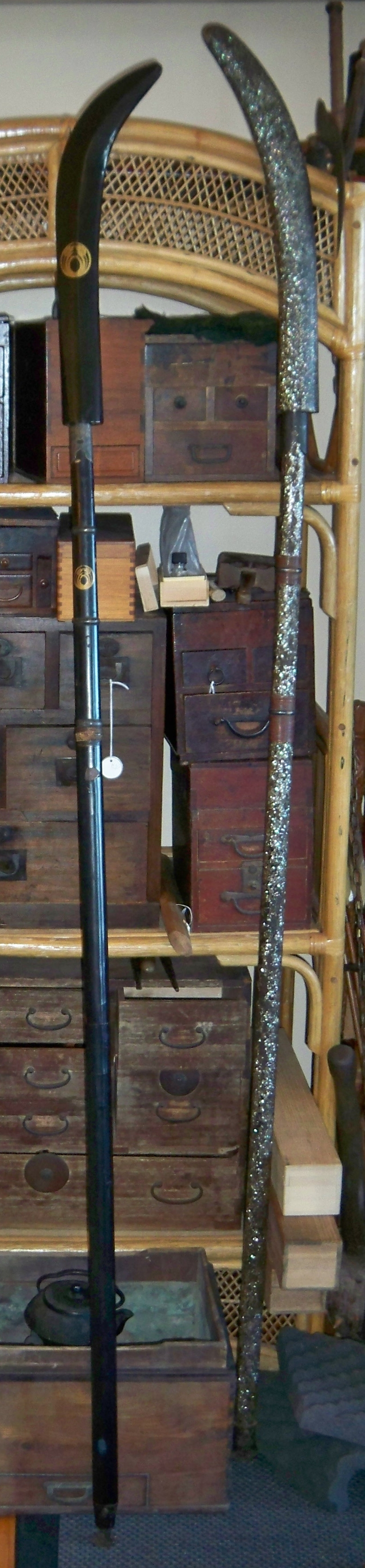 Japanese (samurai)Edo period naginata